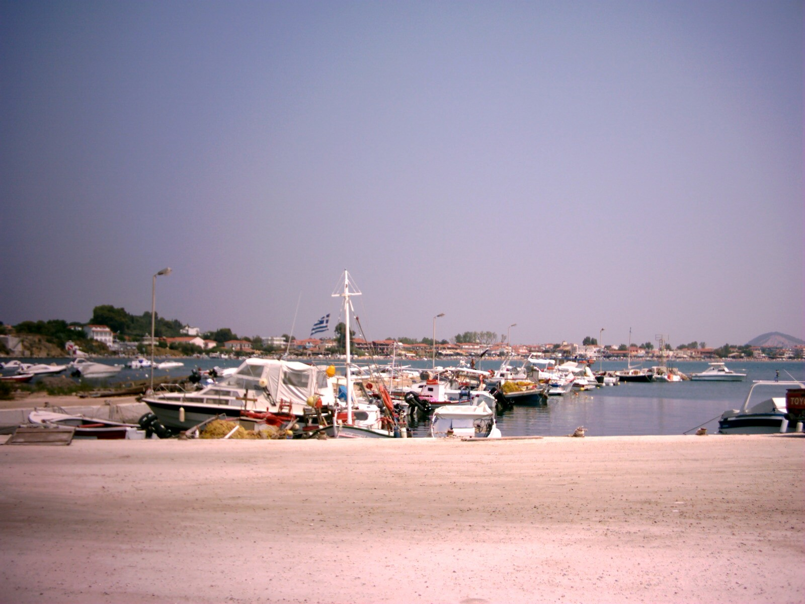 Gezicht op de haven van Laganas, Zakynthos